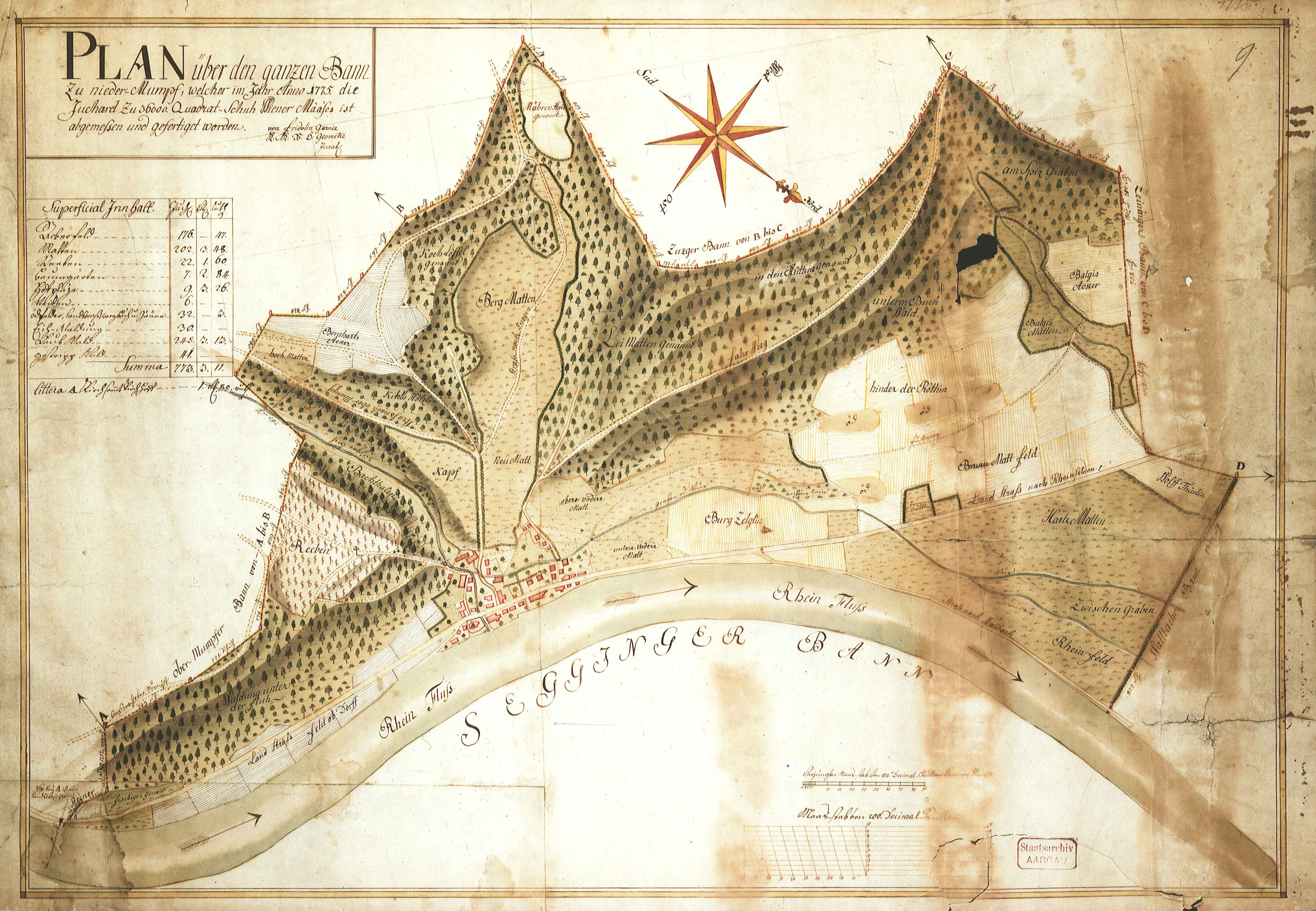 Bannplan Mumpf von 1775, mit den im Dorfrecht festgehaltenen Grenzen.